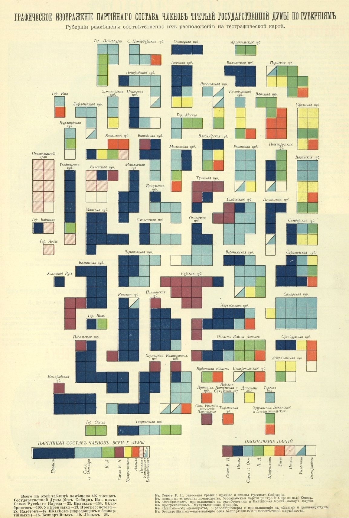 Партийный состав членов третьей Государственной думы по губерниям.